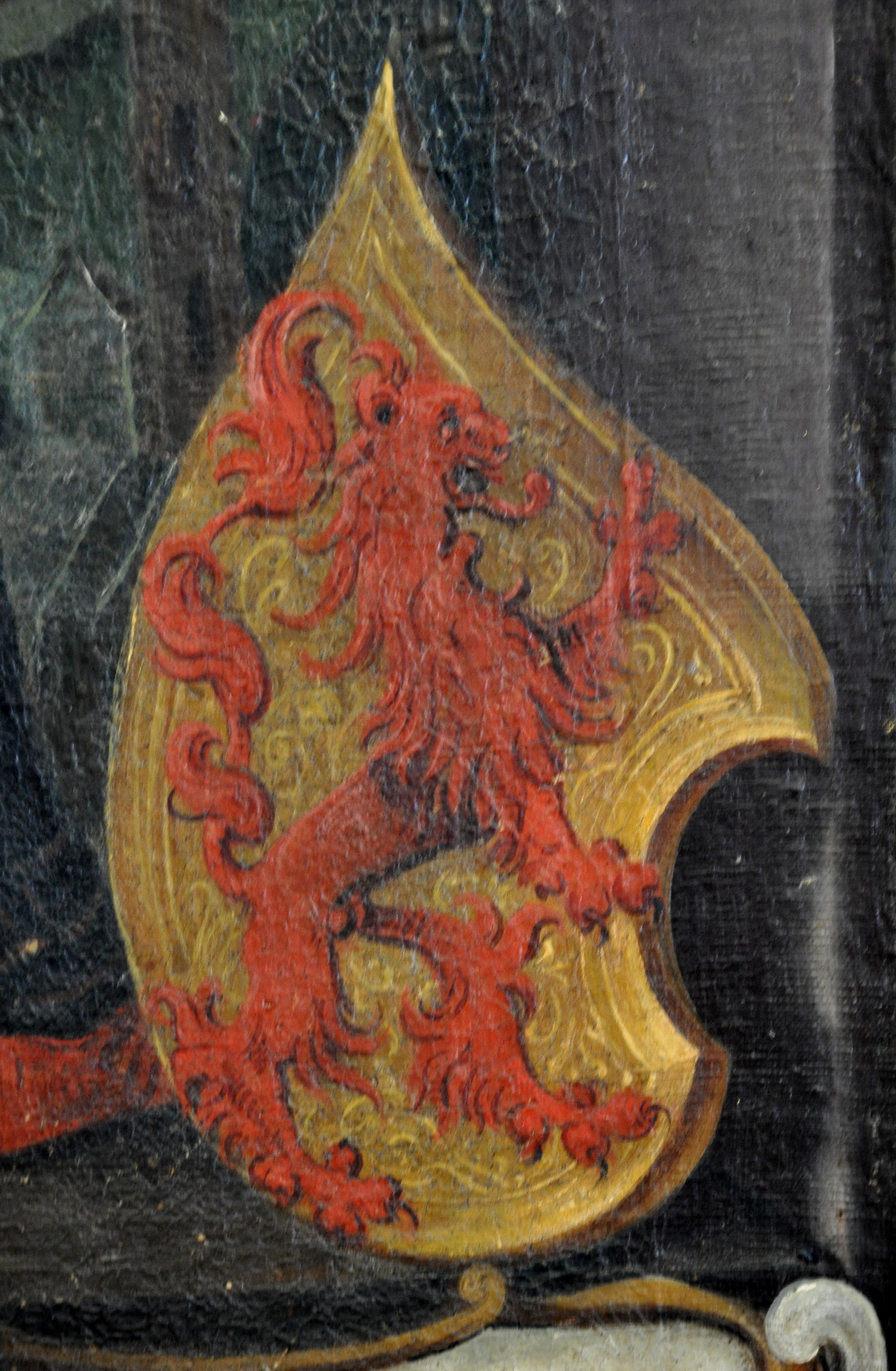 Heinrich von Altdorf Hatta („mit dem goldenen Pflug“), Gemahl der Hatta (Atha) von Hohenwart, Stifter des Frauenklosters in Altdorf um 935; Gemälde von Johann Andreas Rauch, 1613; Stadtmuseum Weingarten; Detail: Wappen